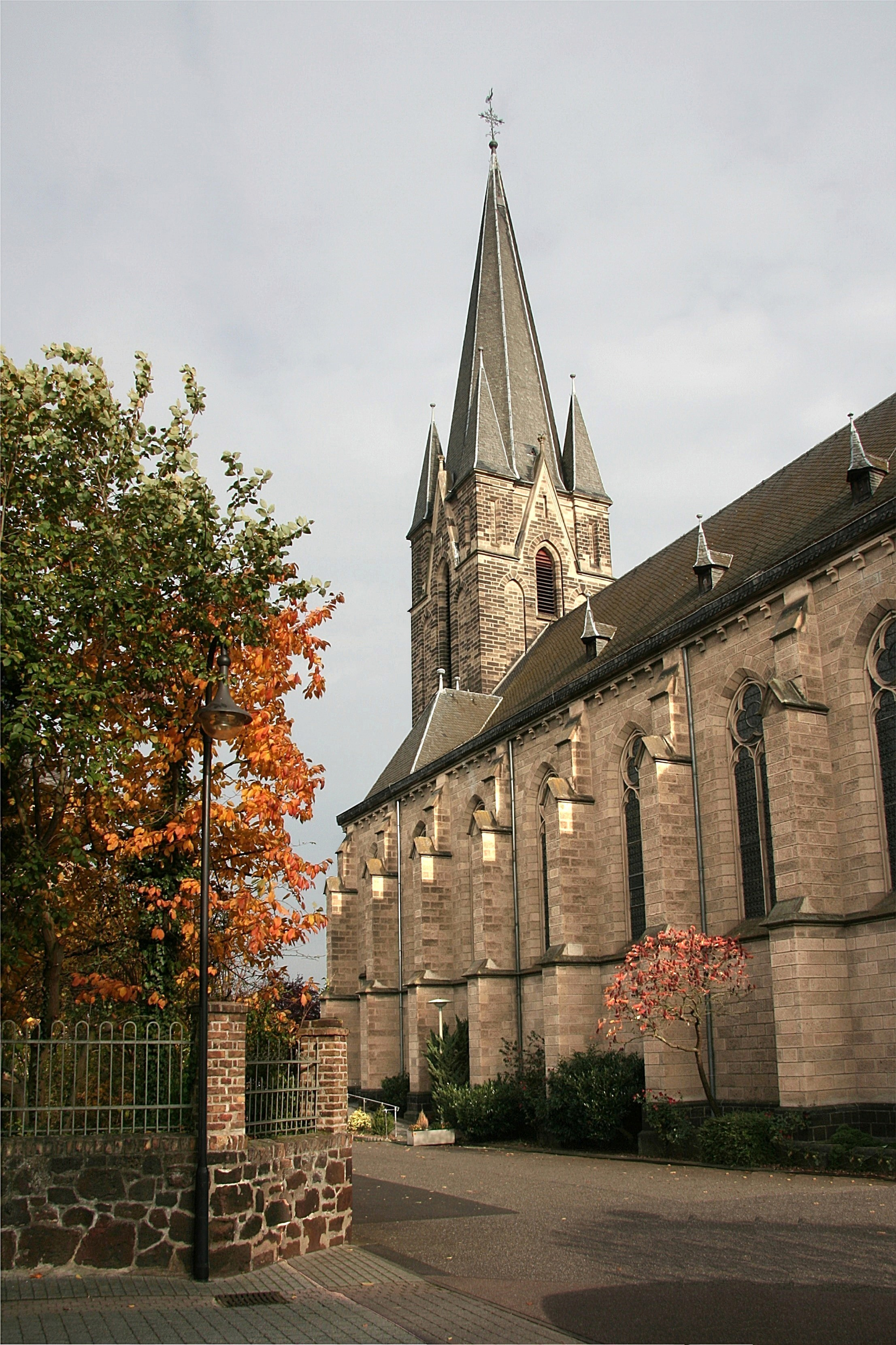 Pfarrkirche Maria Himmelfahrt Mülheim, Westseite